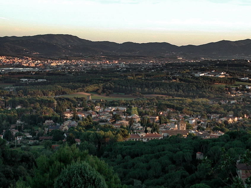 Vista general de l'Ametlla del Vallès (Vallès Oreintal, Catalunya)